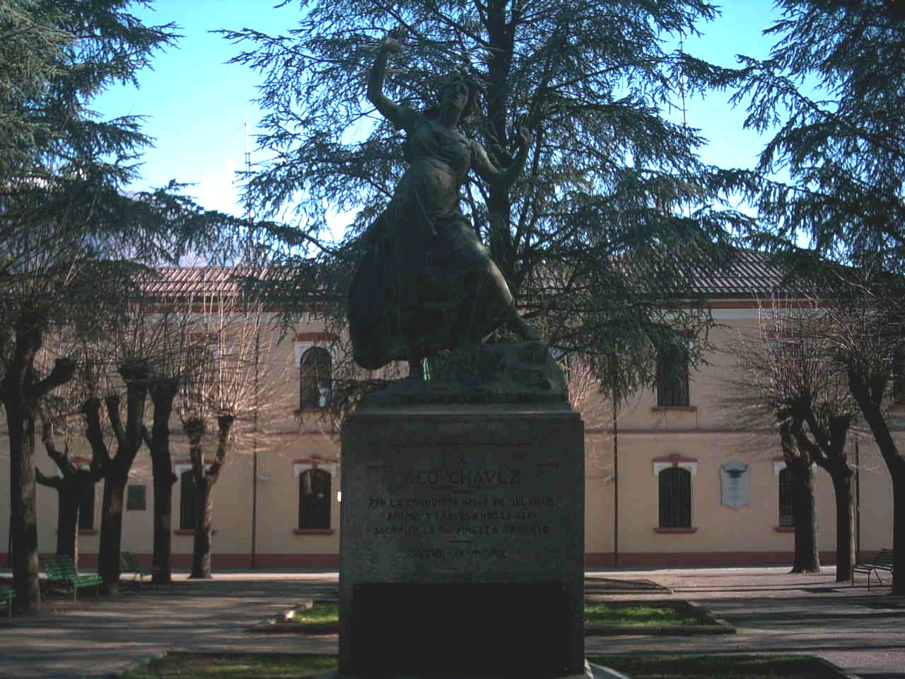 Monumento a Geo Chavez (Jorge Chavez), trasvolatore delle Alpi (1910), a Domodossola (Italia).